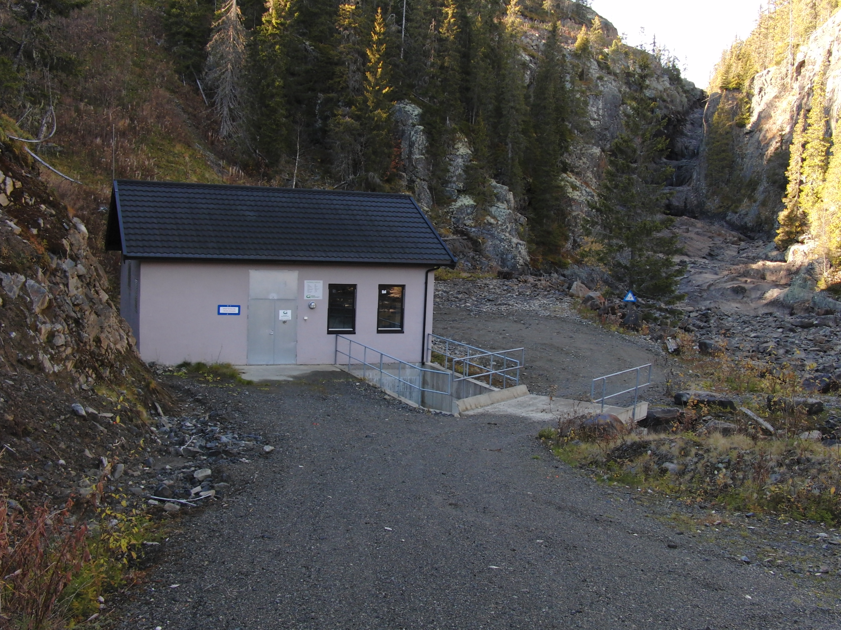 Grytfossen kraftverk